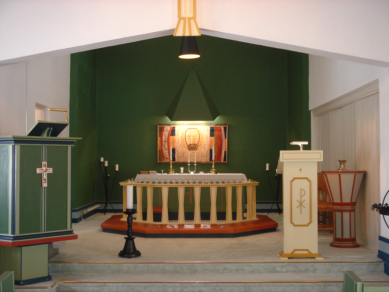 Koret i Gamvik kirke, Altar in Gamvik Church